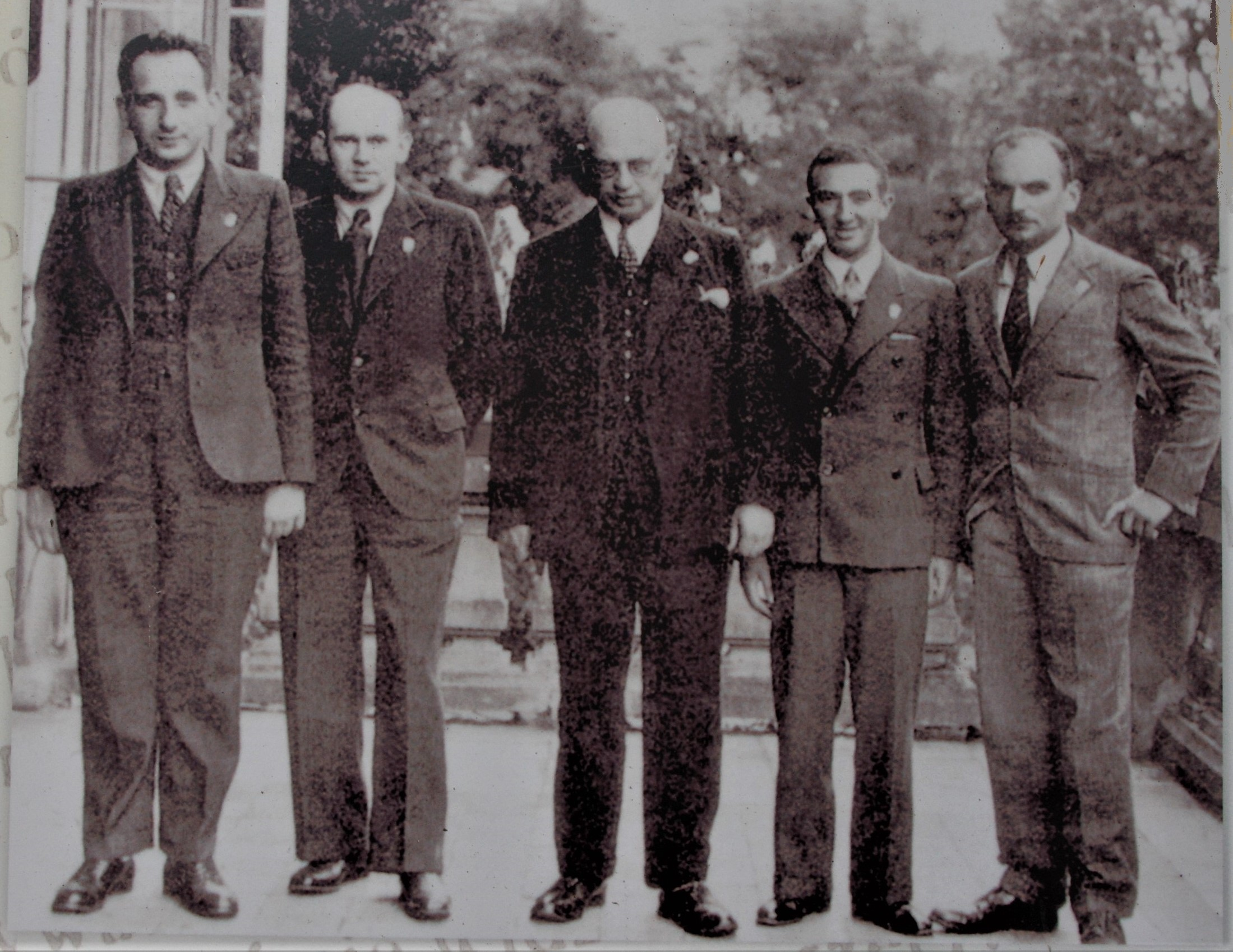 Fragment wystawy plenerowej ”Sport Żydowski w przedwojennej Warszawie” autorstwa dr Jarosława Rokickiego, przygotowanej przez Fundacje im. prof. Mojżesza Schorra, a prezentowanej na przełomie 2012/2013 r., przy ul. Twardej 6 w Warszawie. Na fotografii tablica pt. "Kalendarium: szachy w Warszawie i Polsce", widoczna część ze zdjęciem uczestników IIV Olimpiady Szachowej (1935) reprezentacja Polski, któa zdobyła trzecie miejsce: Paulin Frydman Henryk Friedman, Saawielly Tartakower, Mendel Mosze Najdorf, Kazimierz Makarczyk